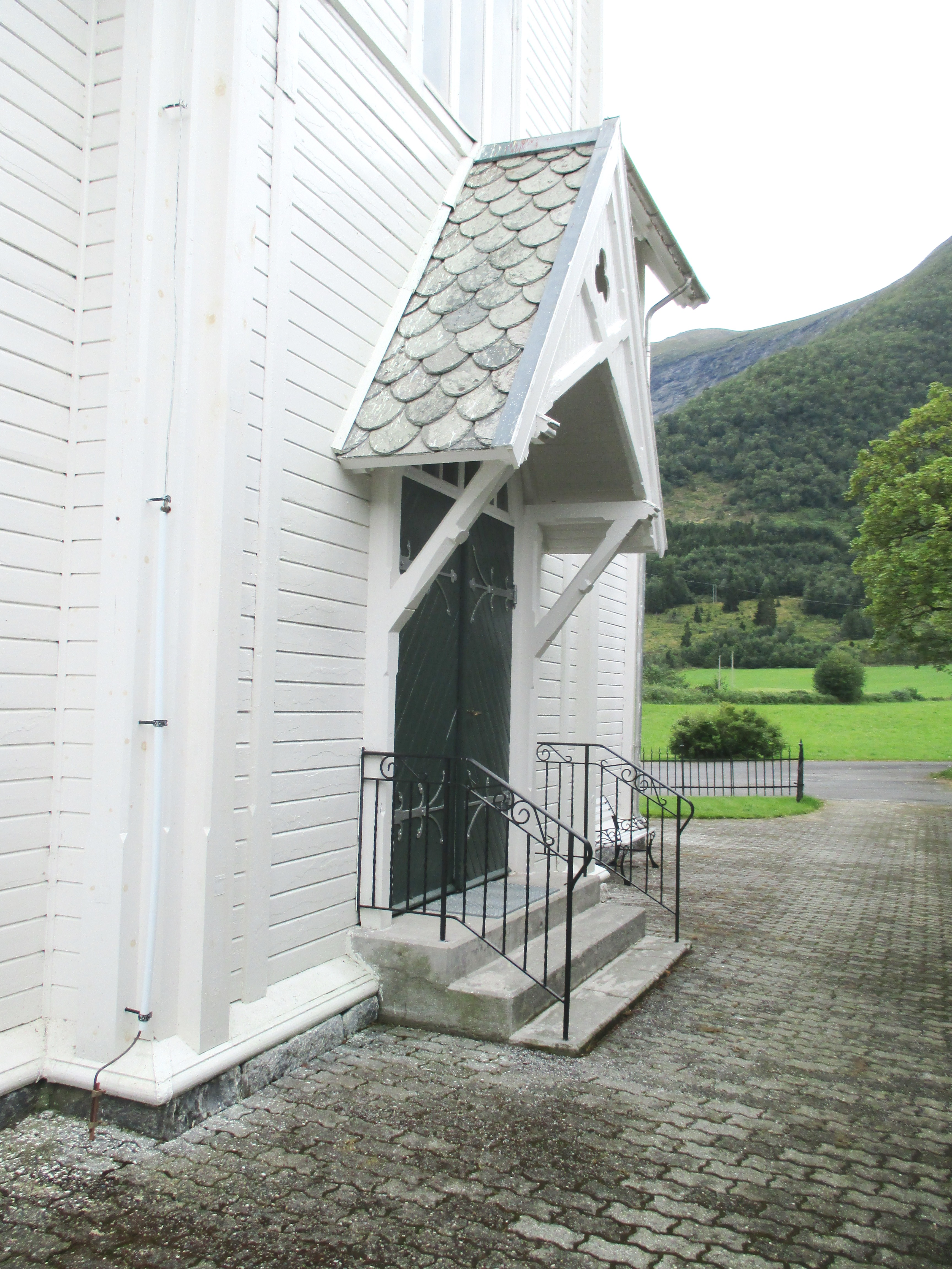 Inngangspartiet ved Voll kirke i Måndalen, med fylkesvei 171 i bakgrunnen